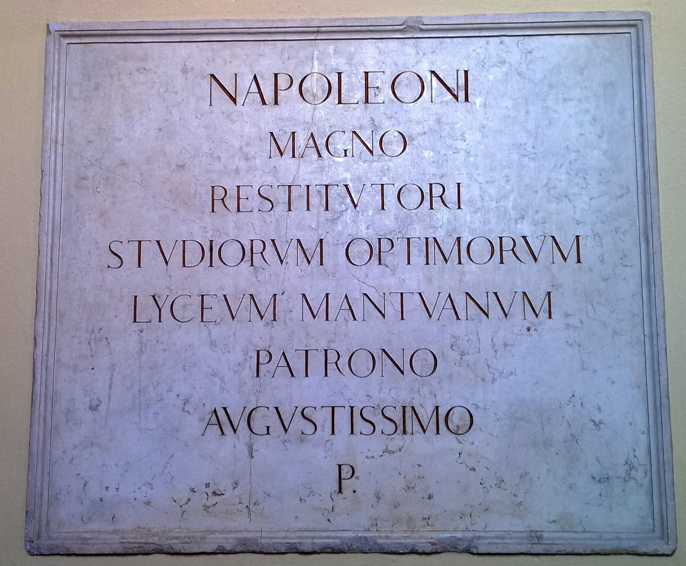 Targa dedicata a Napoleone e alla restituzione al Liceo Mantovano delle aule del Palazzo Studi di Mantova